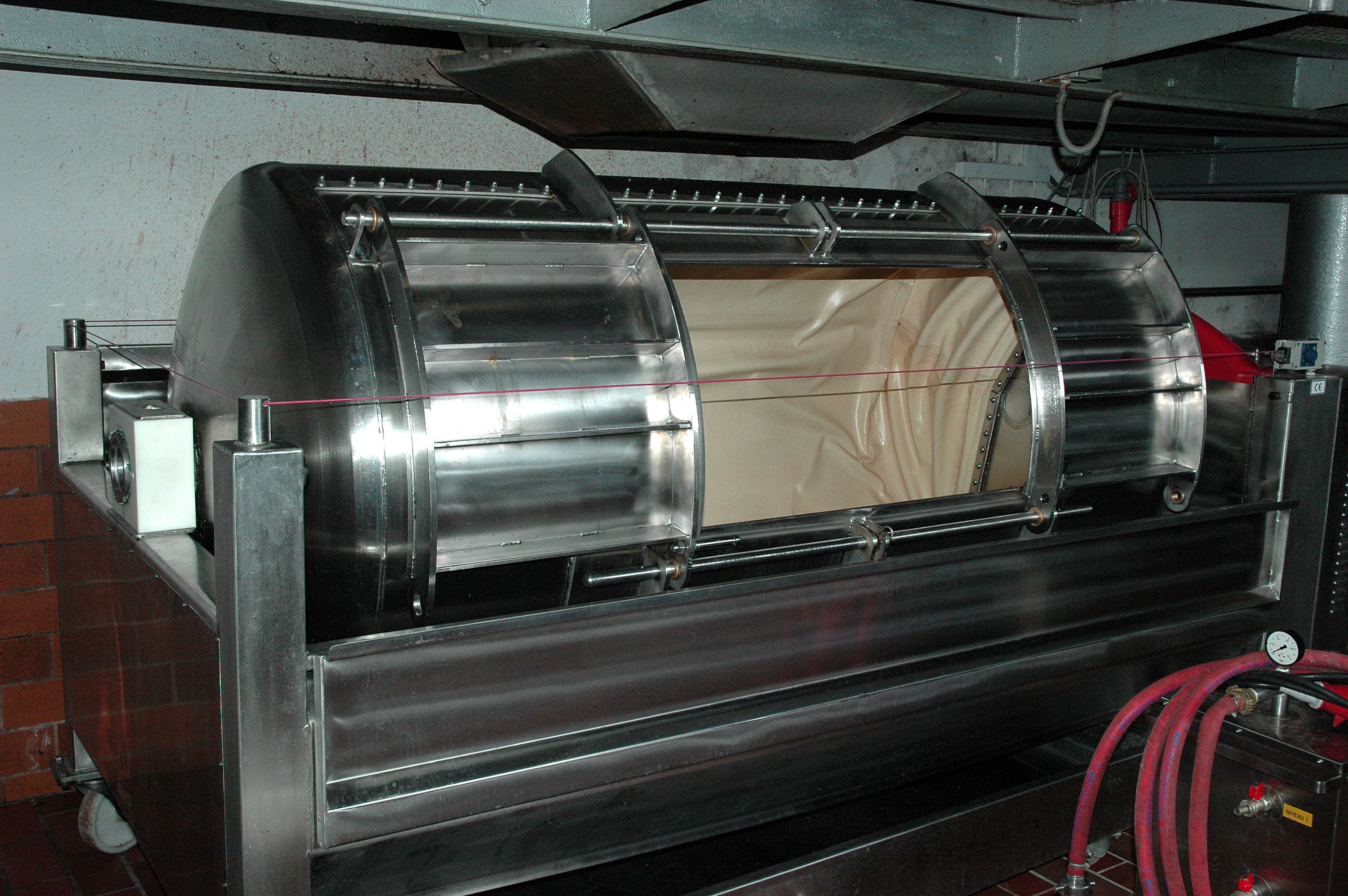 geöffnete Horizontalpresse - Tankpresse